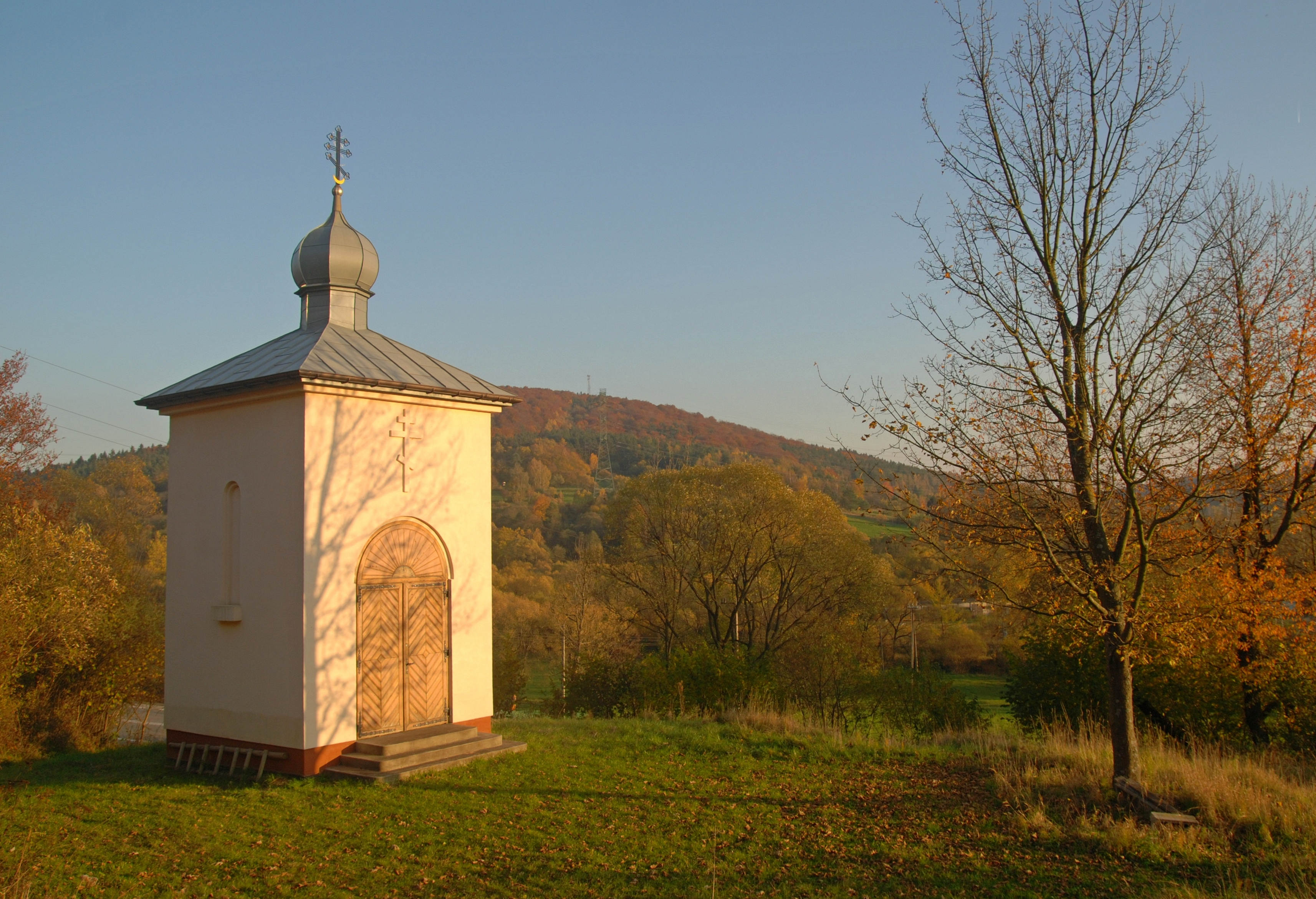 wieś Tylawa